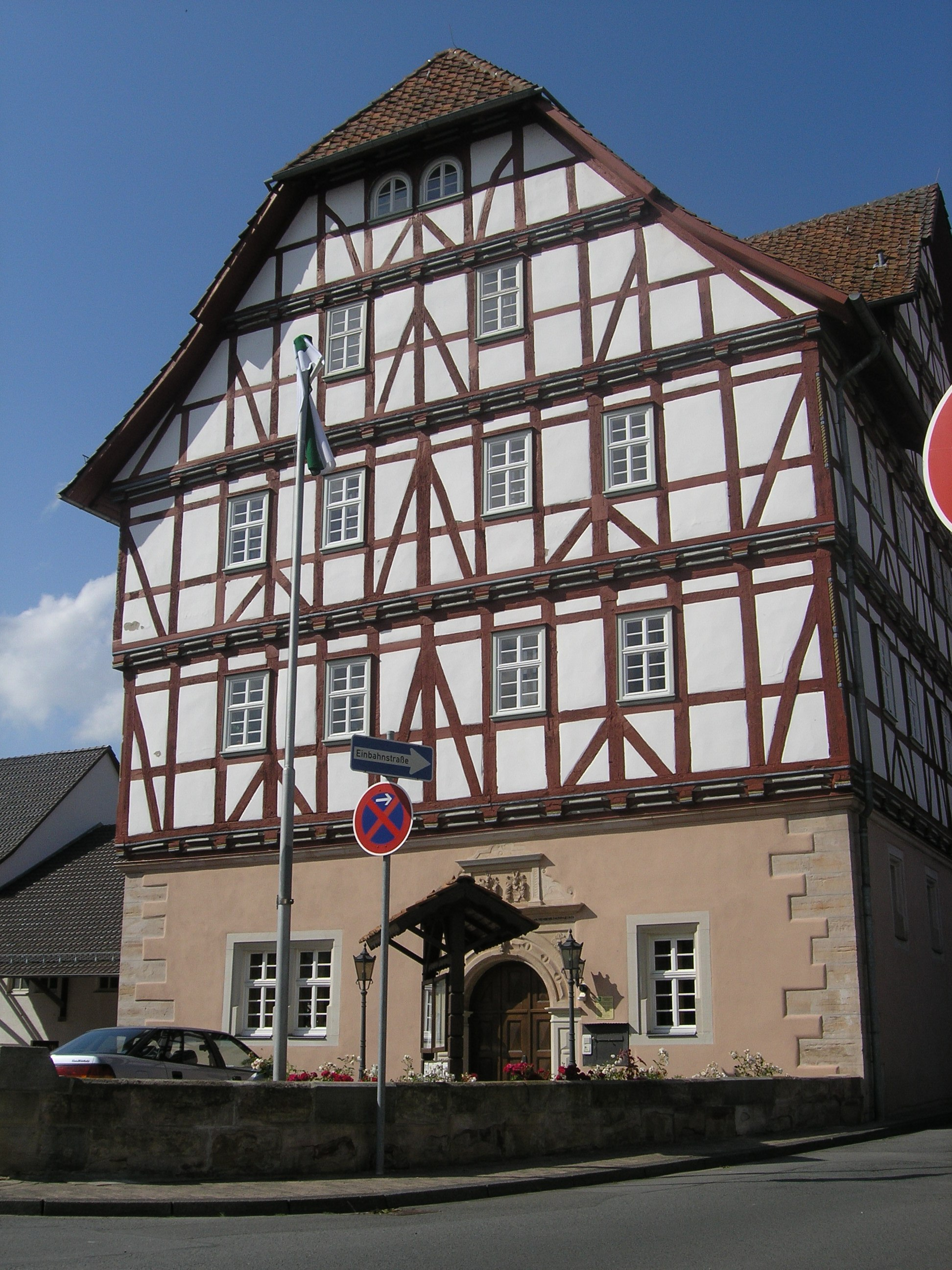 Das Grebendorfer Schloss, Meinhard, Hessen, Germany